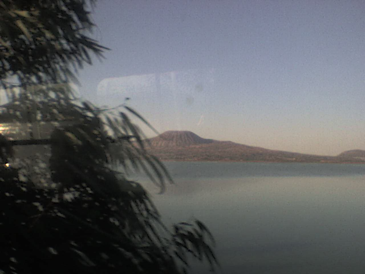 Imagen del Nuevo Lago de Chalco, captada en proximidad a la Delegación Tlahuac. Se aprecia la cara sur-poniente del Volcan de Guadalupe (ó del Borrego) y una parte del Volcan La Caldera, ambos pertenecientes a la Sierra de Santa Catarina. La imagen fue captada a bordo de un Taxi Colectivo que viaja de Chalco a Tlahuac, en una visita a esa región comprendida entre el Estado de México y el Distrito Federal.